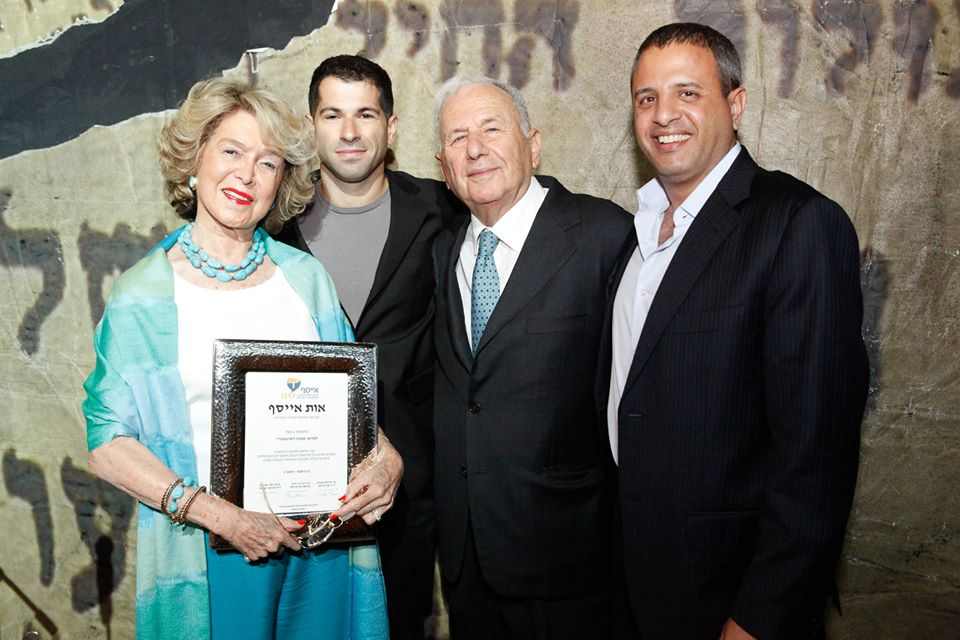 פעילות. הענקת אות אייסף לאמנון רובינשטיין צילום - עופר עמרם.